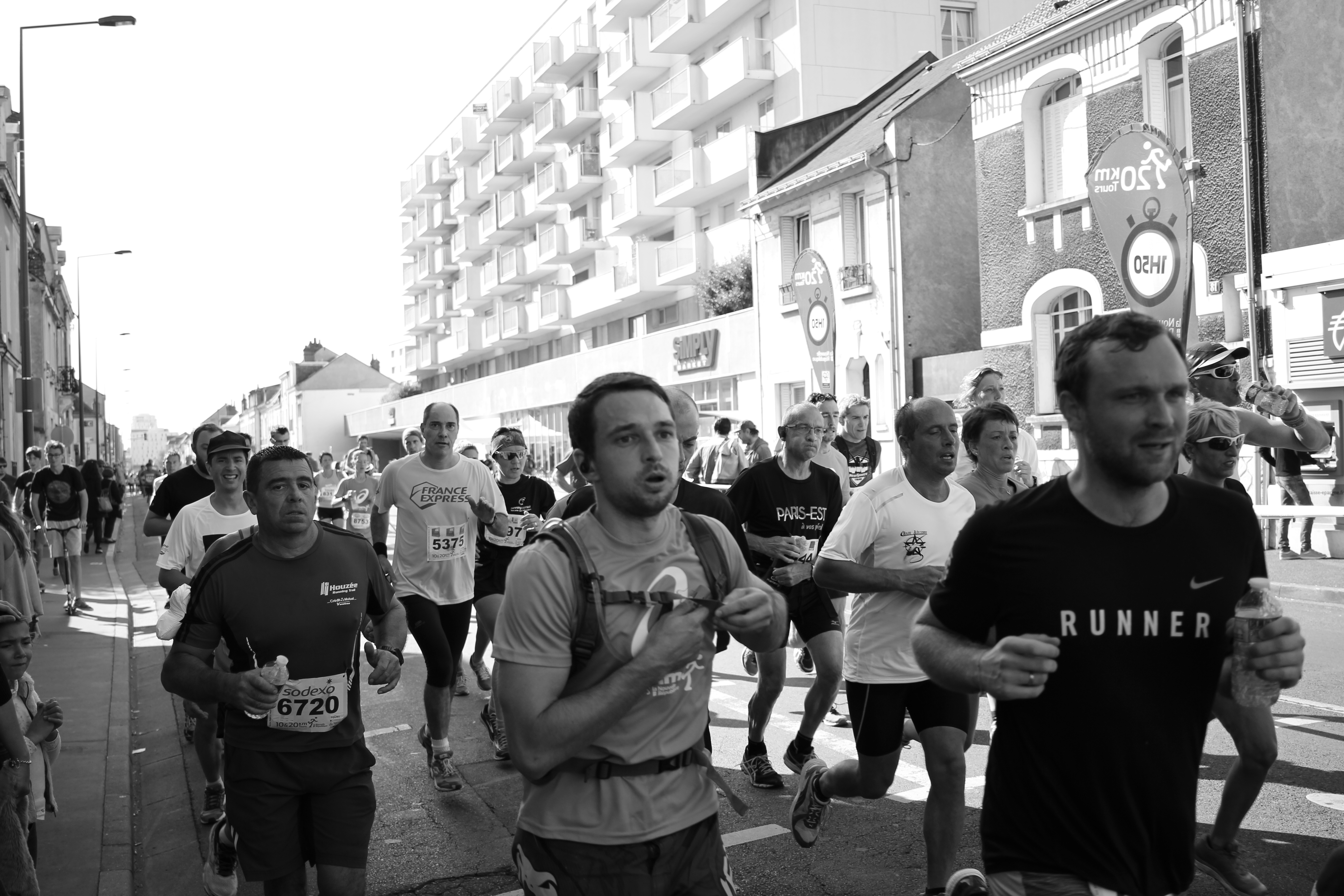 10 et 20 km de Tours, le 24 septembre 2017, aux environs de la Place Rabelais